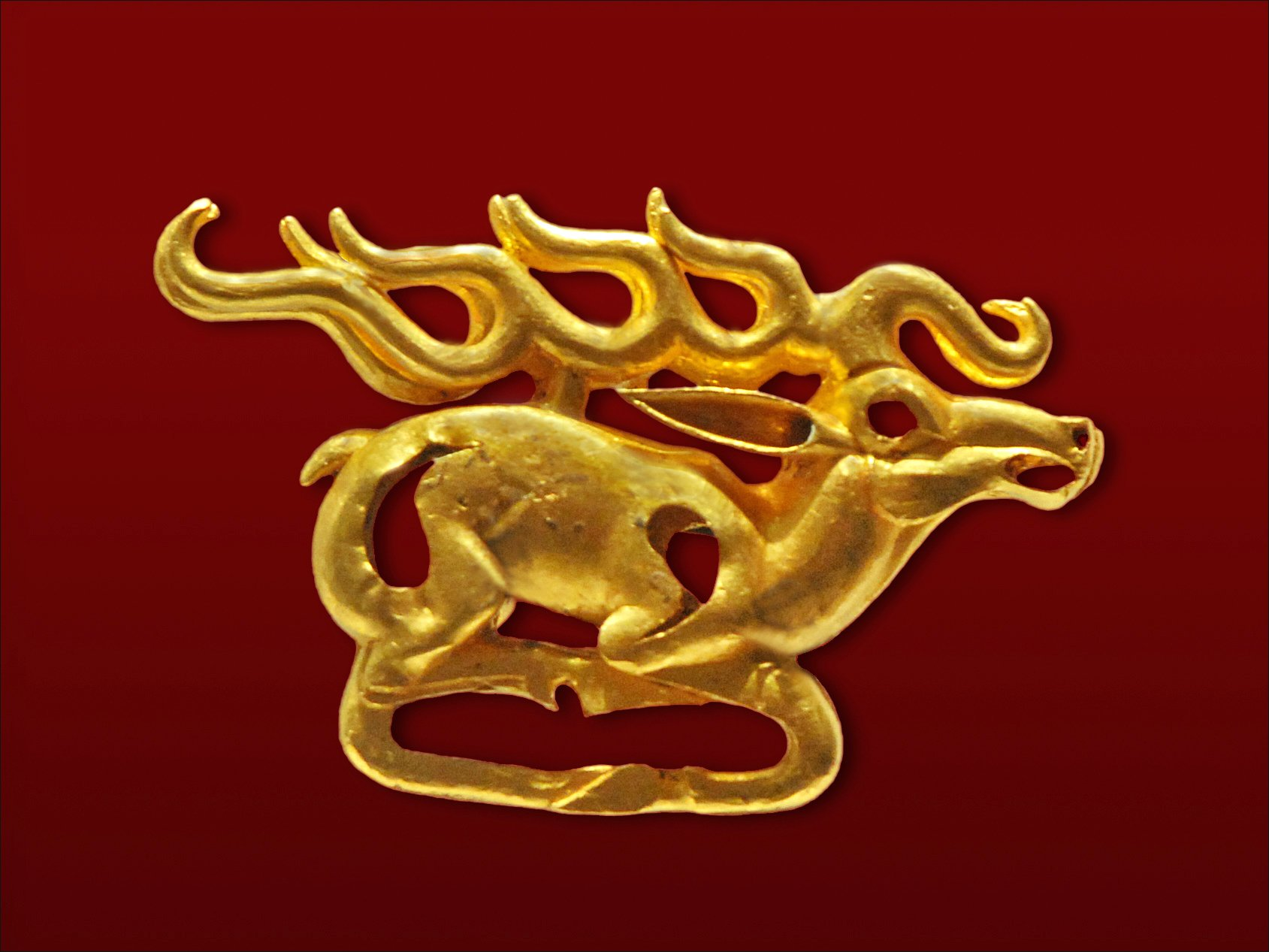 Applique de vêtement en forme de daim Trésor de Zhalauly Région d'Almaty Sud-est du Kazakhstan VIIIè-VIIè siècle avant notre ère Or Objet présenté dans l'exposition « Kazakhstan Hommes, bêtes et dieux de la steppe » au Musée Guimet, musée national des arts asiatiques jusqu'au 31 janvier 2011 Cette petite exposition qui fait découvrir la culture du Kazakhstan est à ne pas manquer, elle se termine le 31 janvier 2011 ! Les objets en or sont de petites merveilles tout comme les objets utilisés dans les yourtes ou ceux qui servent à monter à cheval, la grande spécialité de ce peuple de nomades.